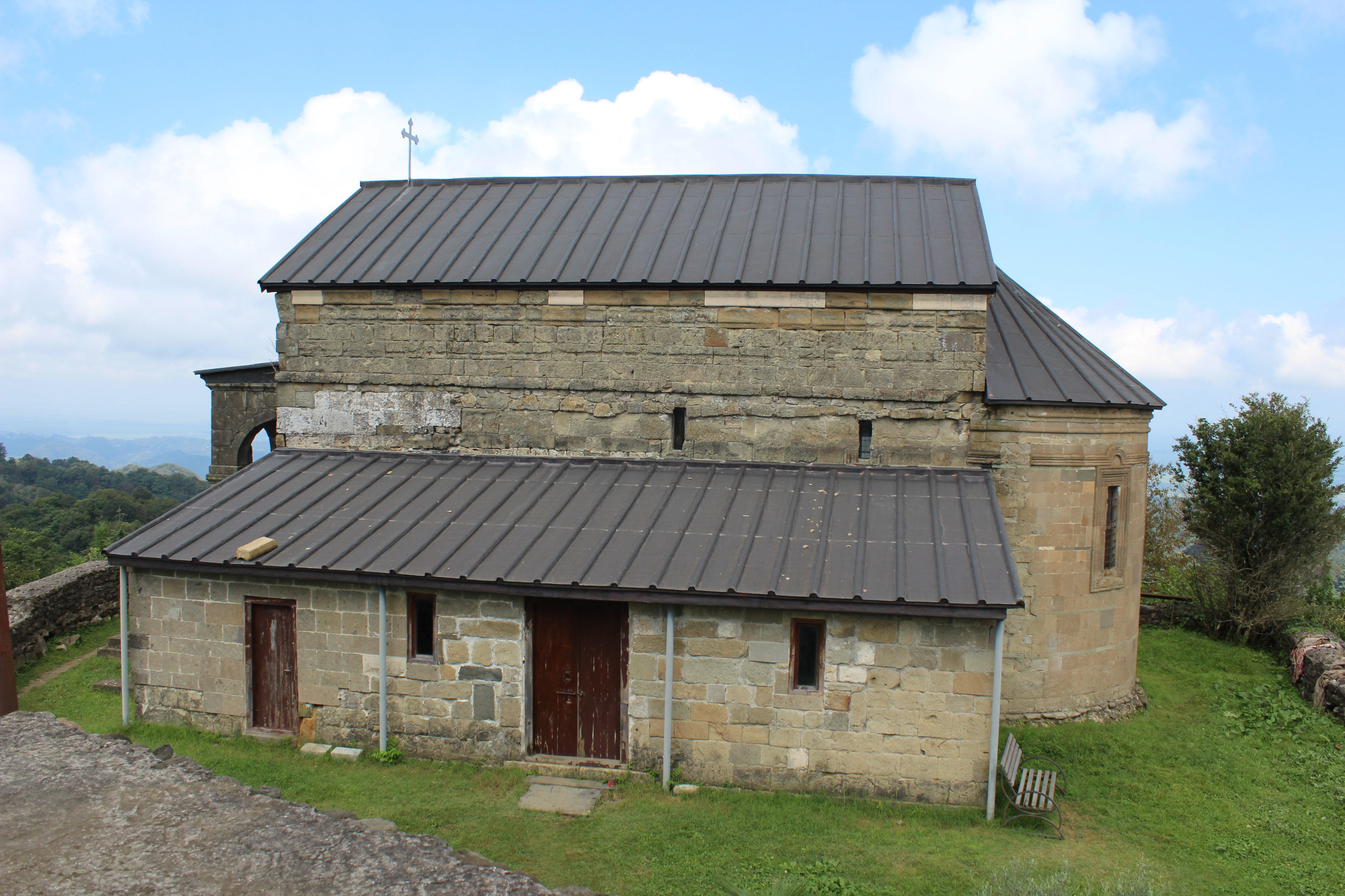 ჯუმათის ეკლესია